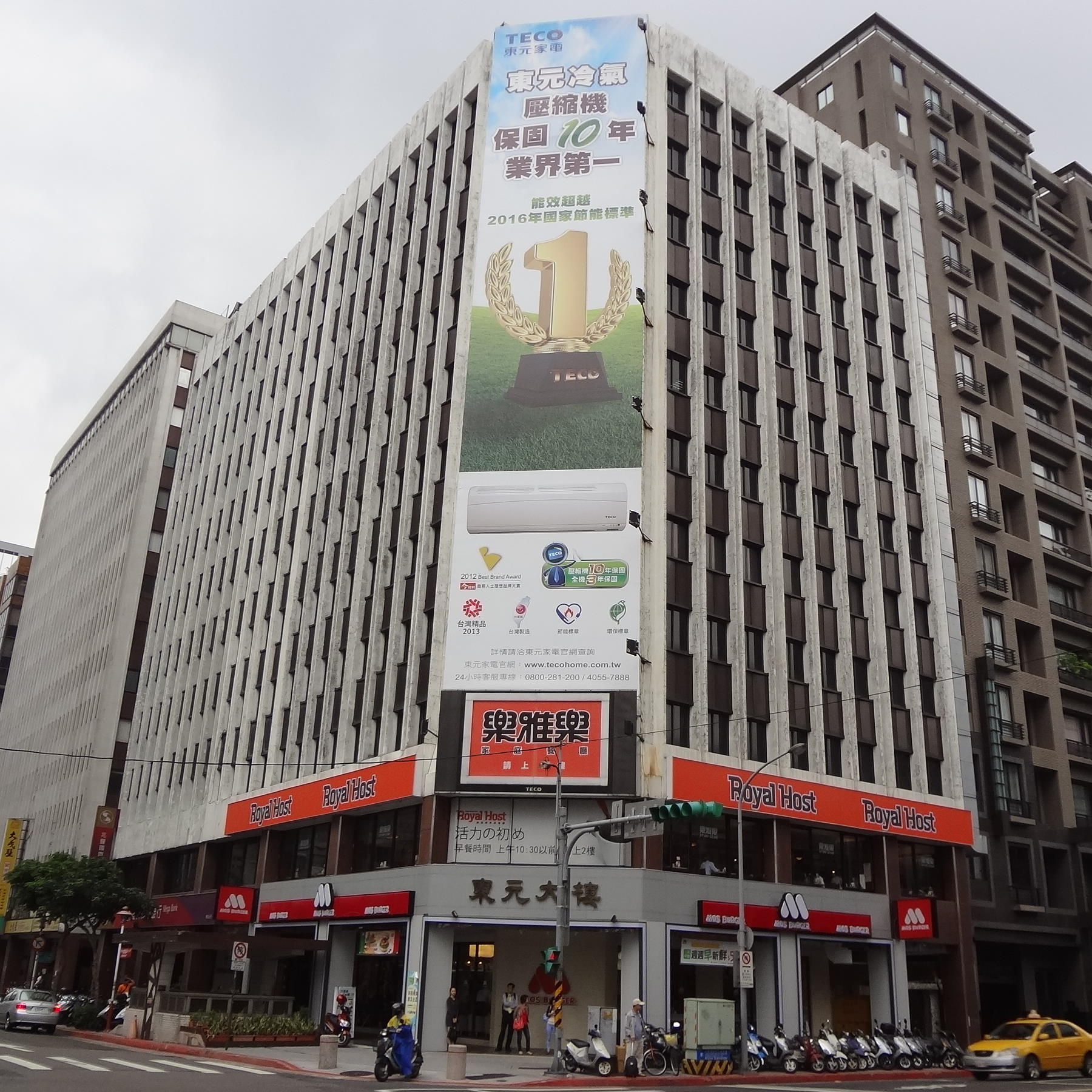 東元大樓，位於臺北市中山區松江路與長春路口。